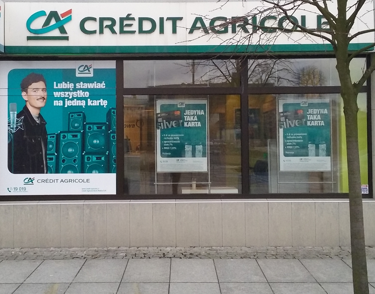 Bank Crédit Agricole w 60-tysięcznym Tomaszowie Mazowieckim, w województwie łódzkim